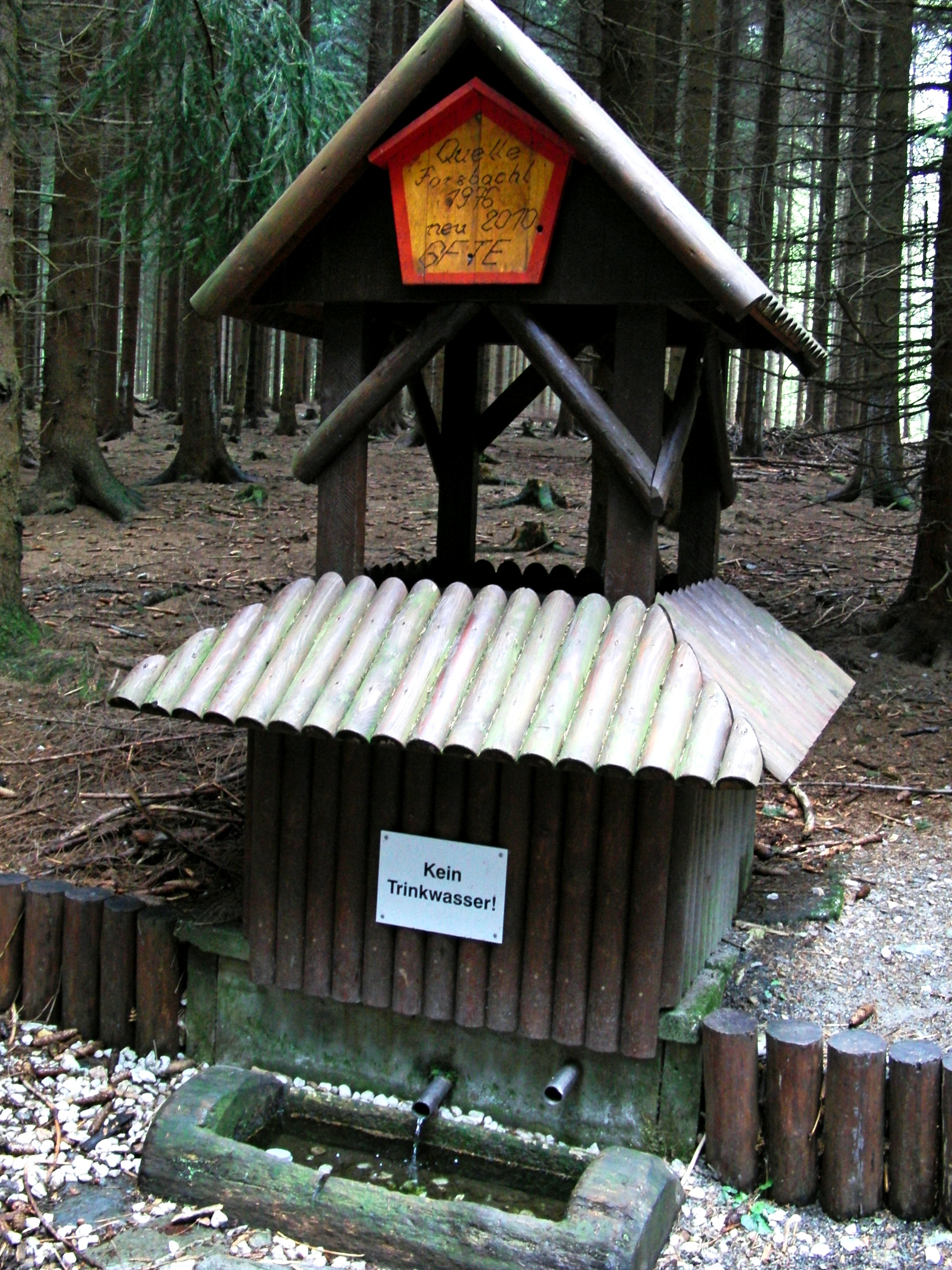 Entlang des Thalheimer Rundweges. Forzbachel-Quelle